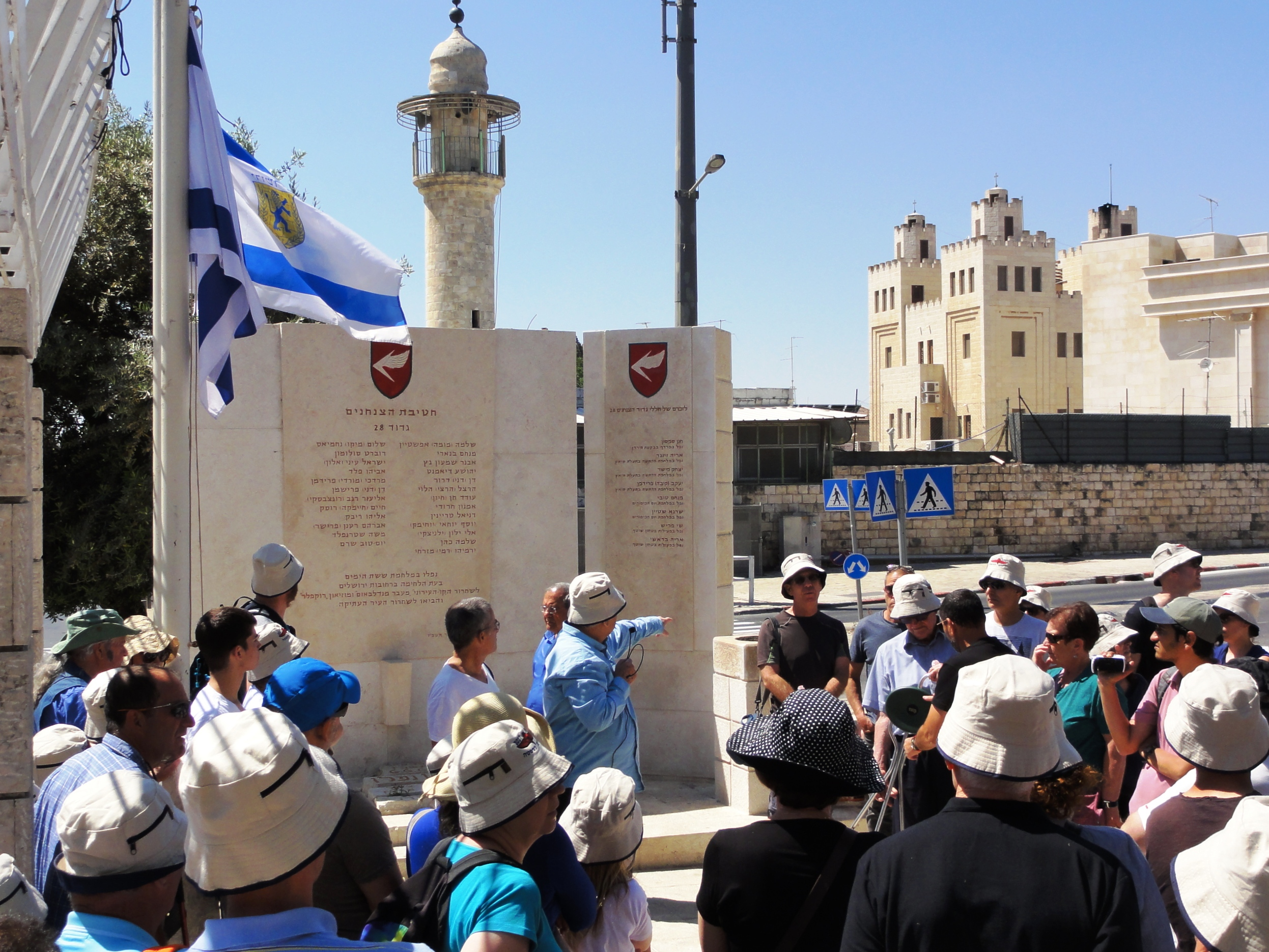 עופר פדה, שנפצע ב"סמטת המוות" מתאר את הקרב ליד אנדרטת גדוד 28 יום ו', 12 במאי, 2017